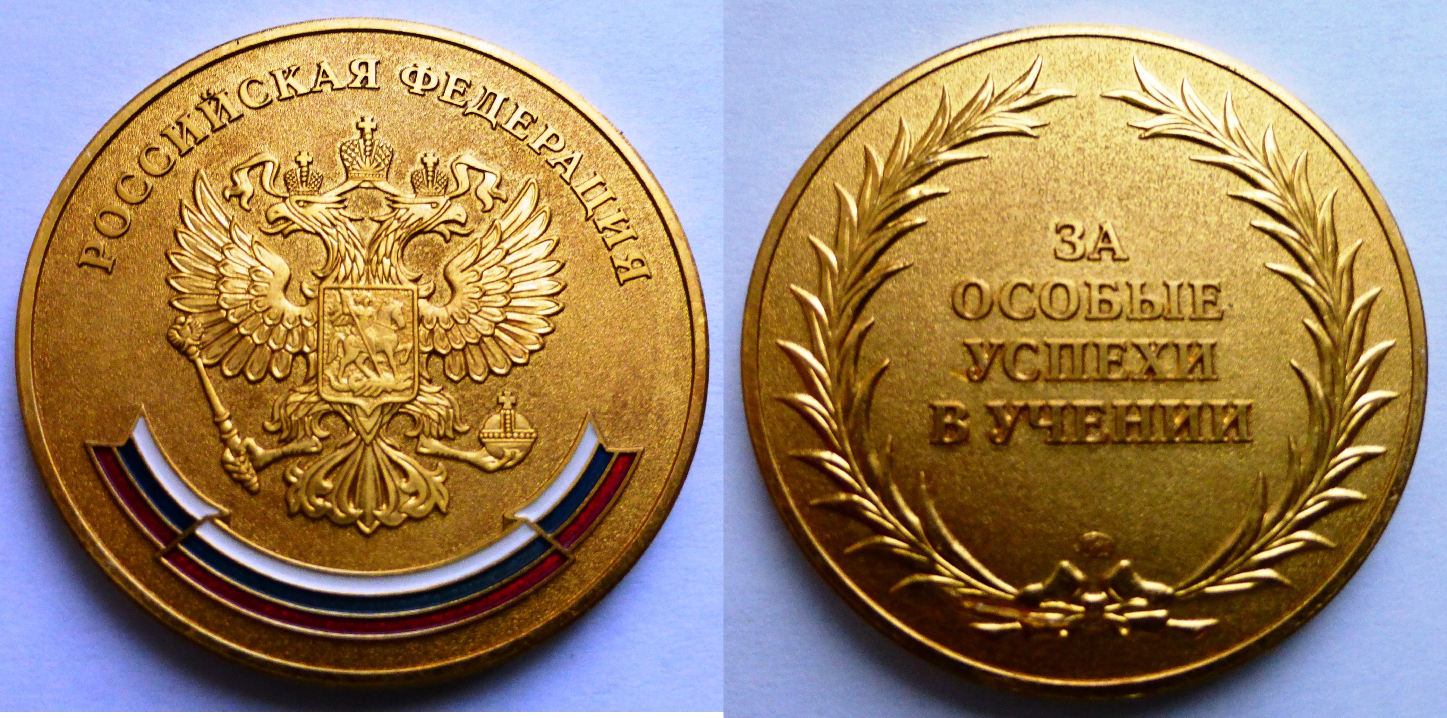 "Золотая" медаль выпускника средней школы Российской Федерации (2011 год). Диаметр медали 40 мм